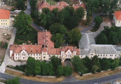 Hajmáskér, Hungary, aerialphotography